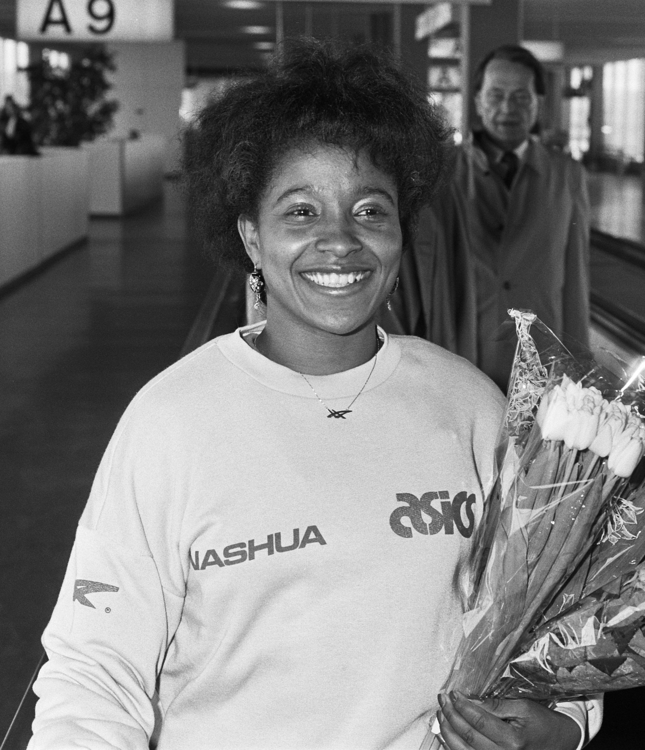 Nelli Cooman met bloemen op Schiphol